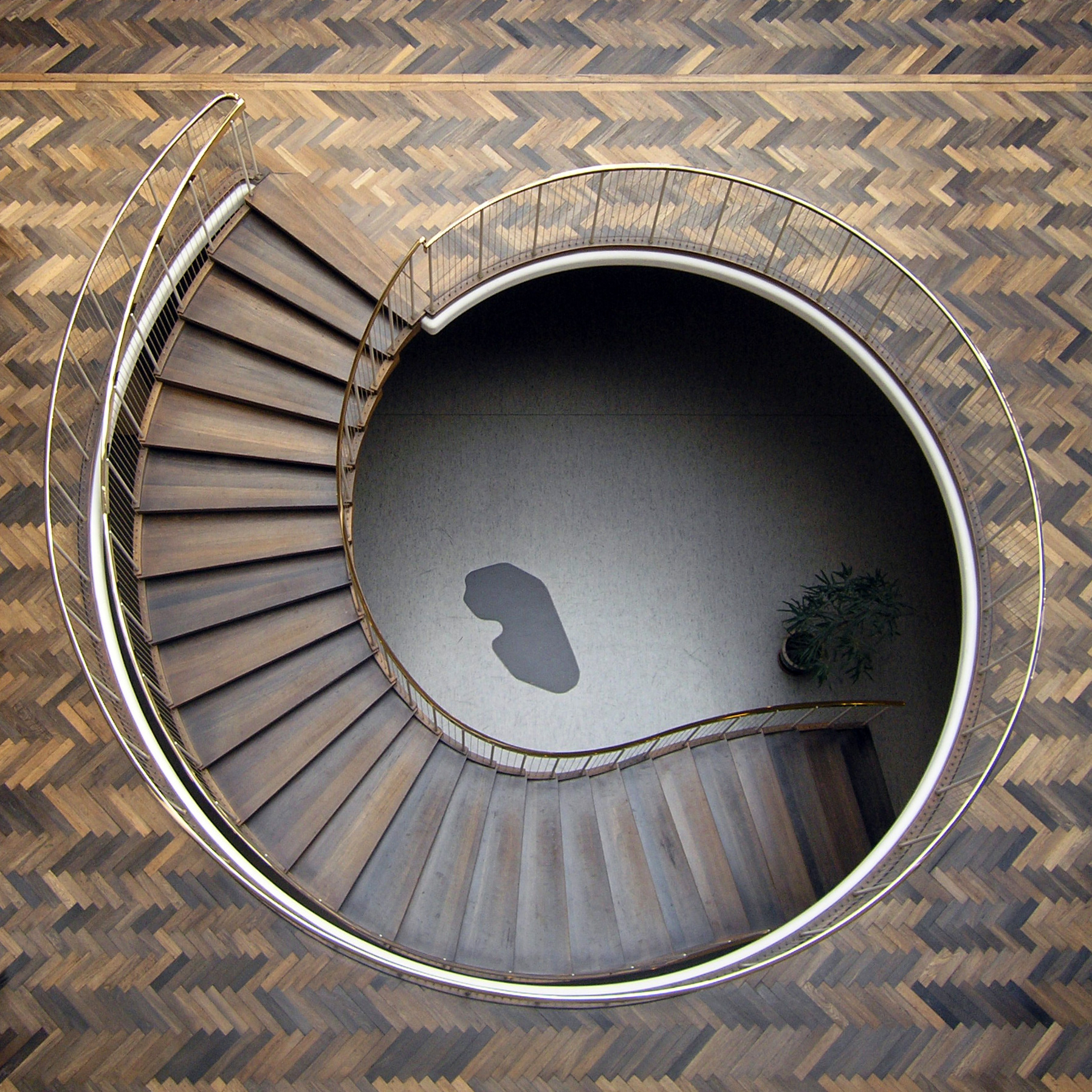 aarhus town hall, aarhus, denmark, 1937-1942. architects: arne jacobsen, 1902-1971, with erik møller, 1909-2002.